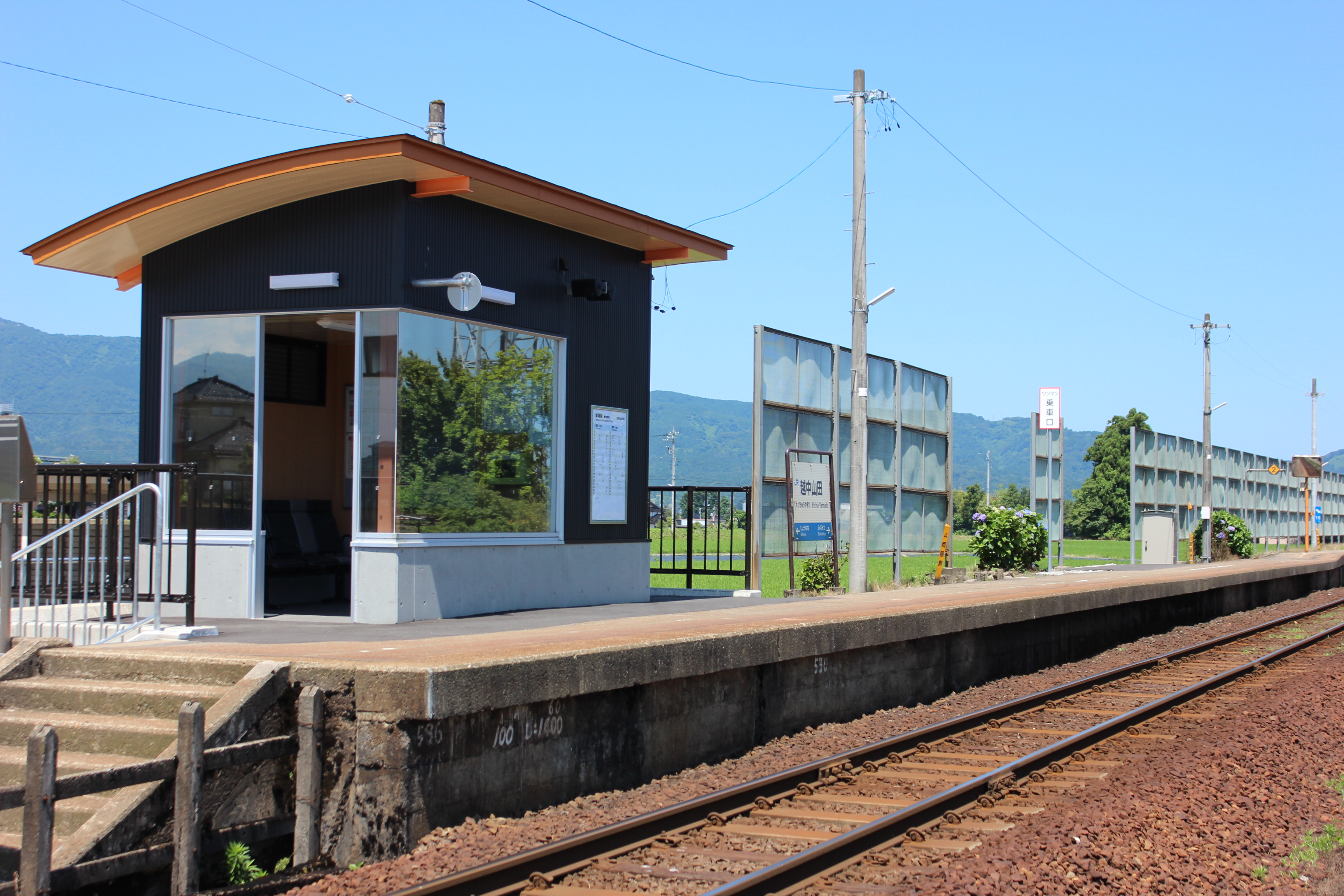 JR城端線越中山田駅（富山県南砺市） Canon EOS Kiss X5